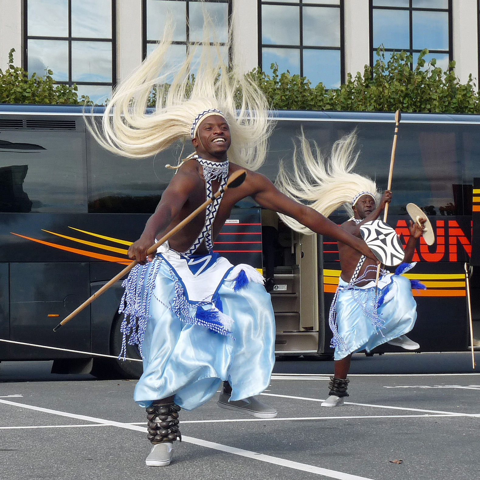 Danseurs du Ballet national du Rwanda dans le cadre du 22e Festival international de géographie de Saint-Dié-des-Vosges